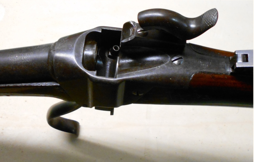 Sharps 1852 Verschl offen